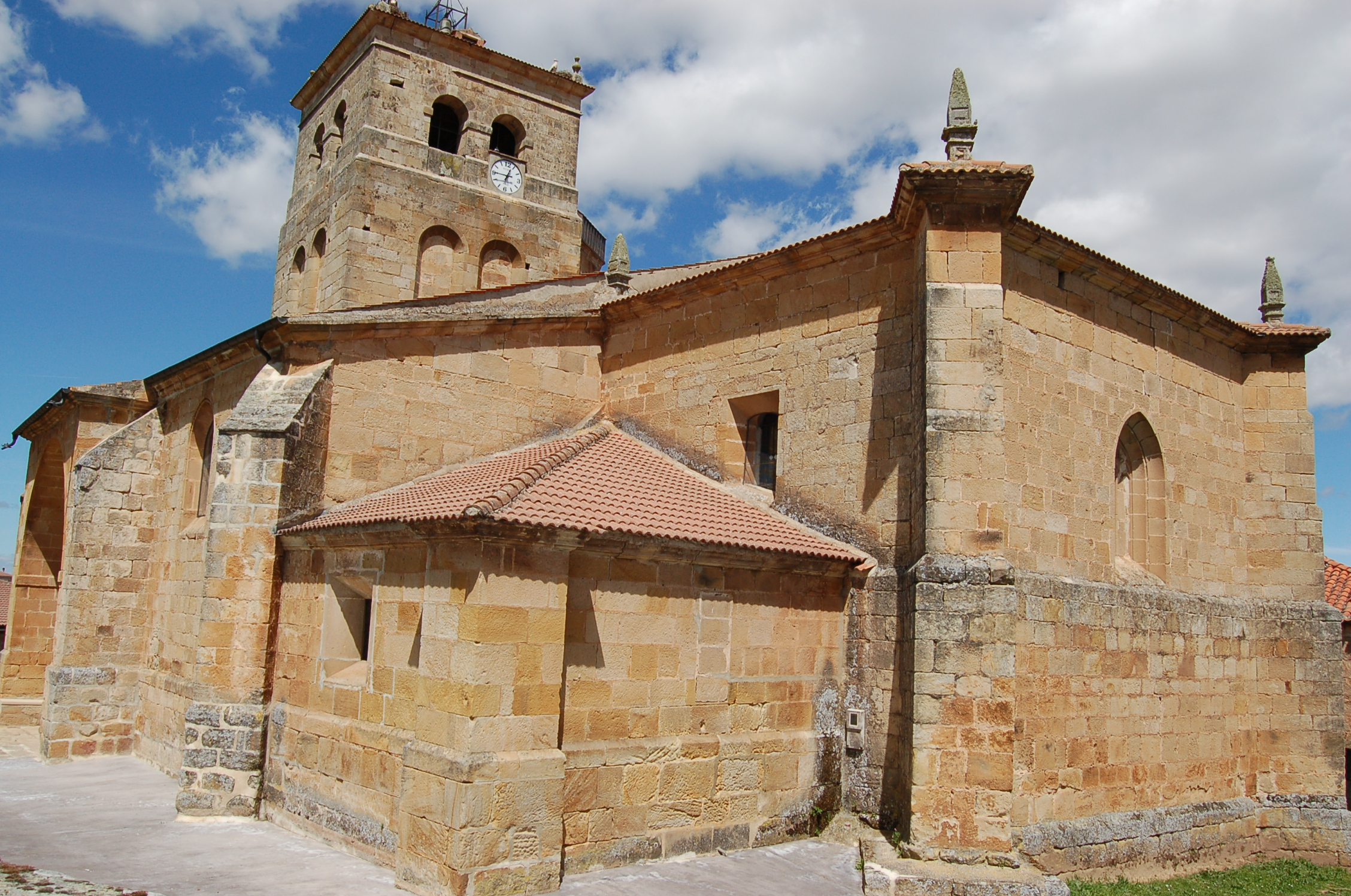 Iglesia de Castrillo de la Reina